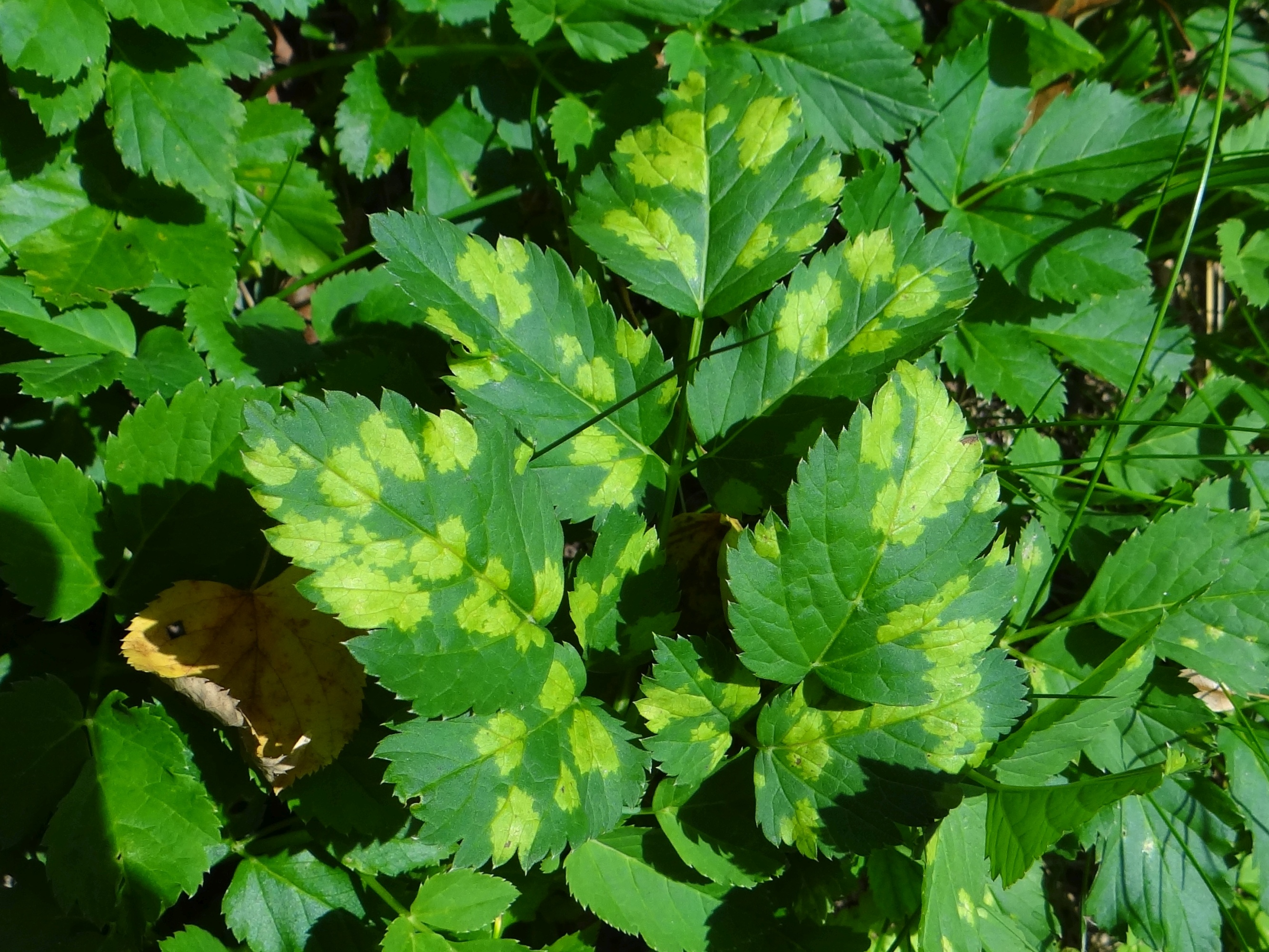 Plasmopara nivea on Aegopodium podagraria (location: Poland, Pieniny, Dolina Białej Wody)